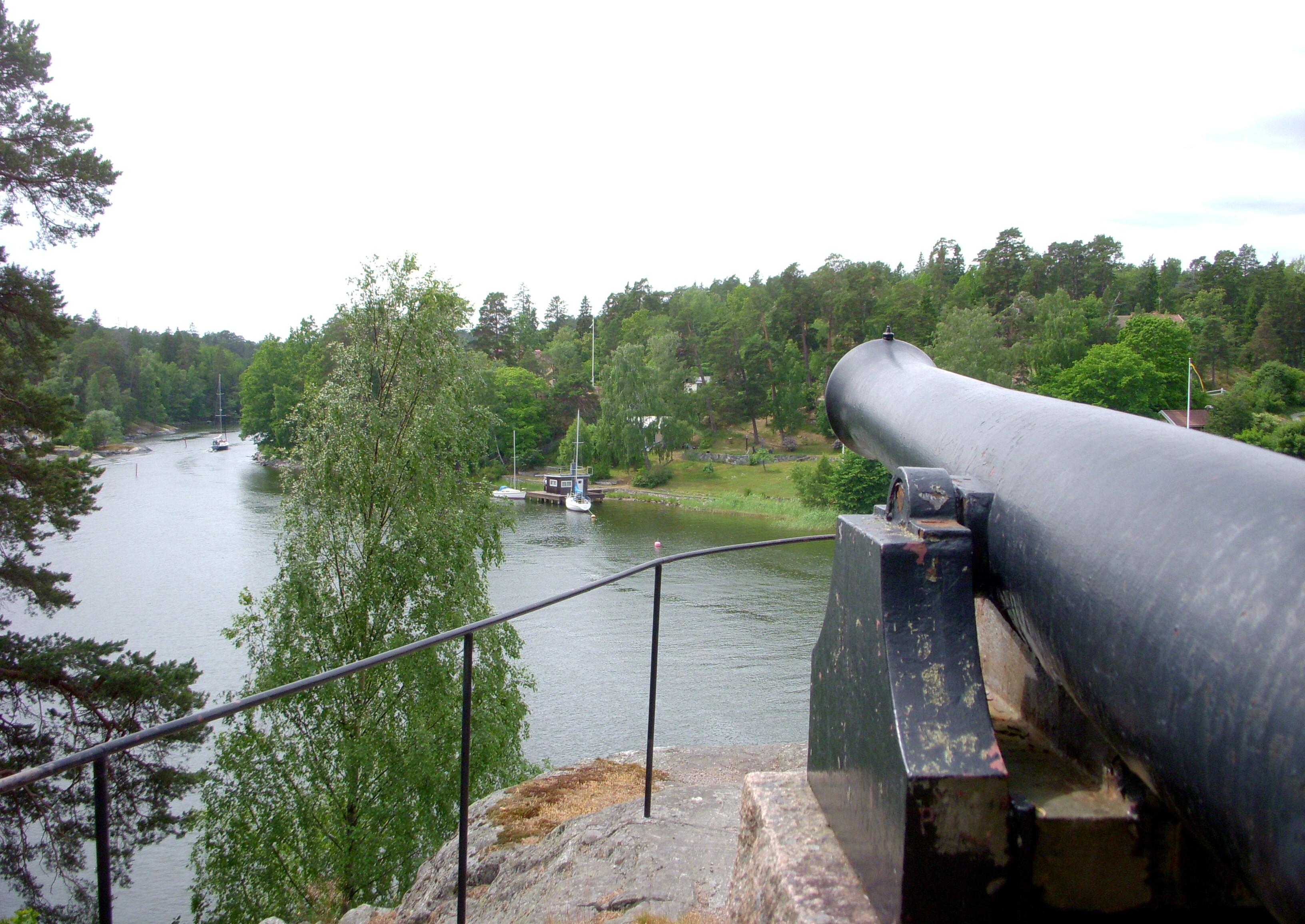 Minnessten "Skogsömonumentet" vid Baggenstäket till minnet av "slaget vid Stäket", rest 1905